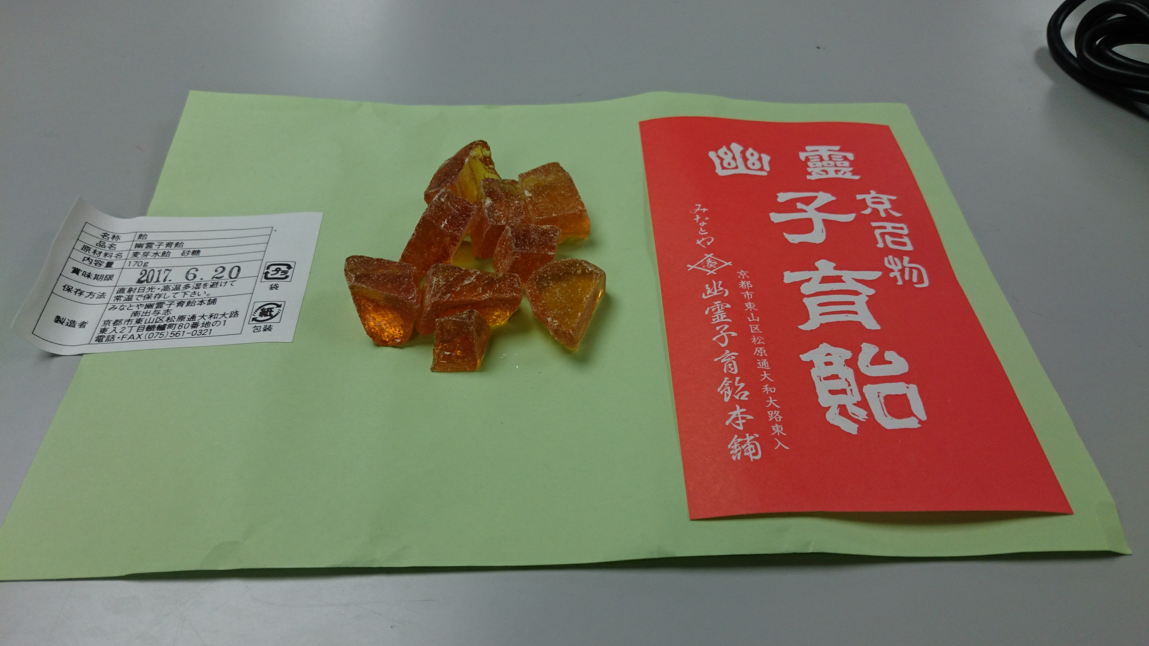 幽霊子育飴みなとやで売られている商品